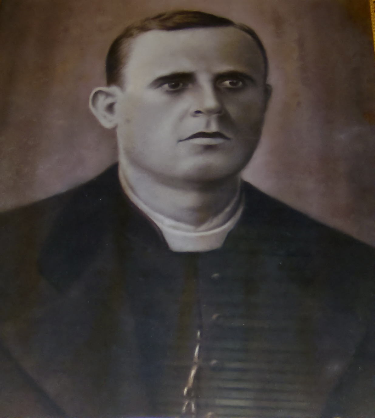 Padre Emídio Fernandes, ex-paróco do município da Serra da Raiz, estado da Paraíba.